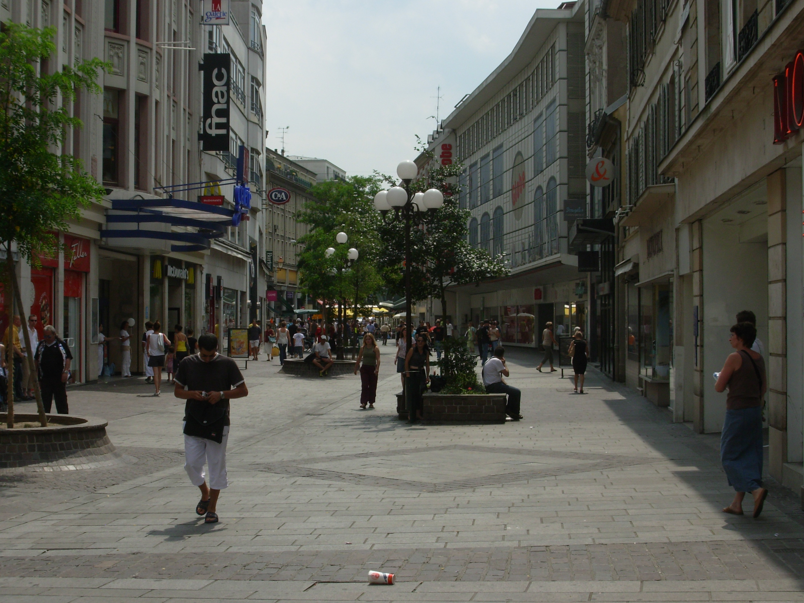 Rue du Sauvage, Mulhouse, Alsace, France